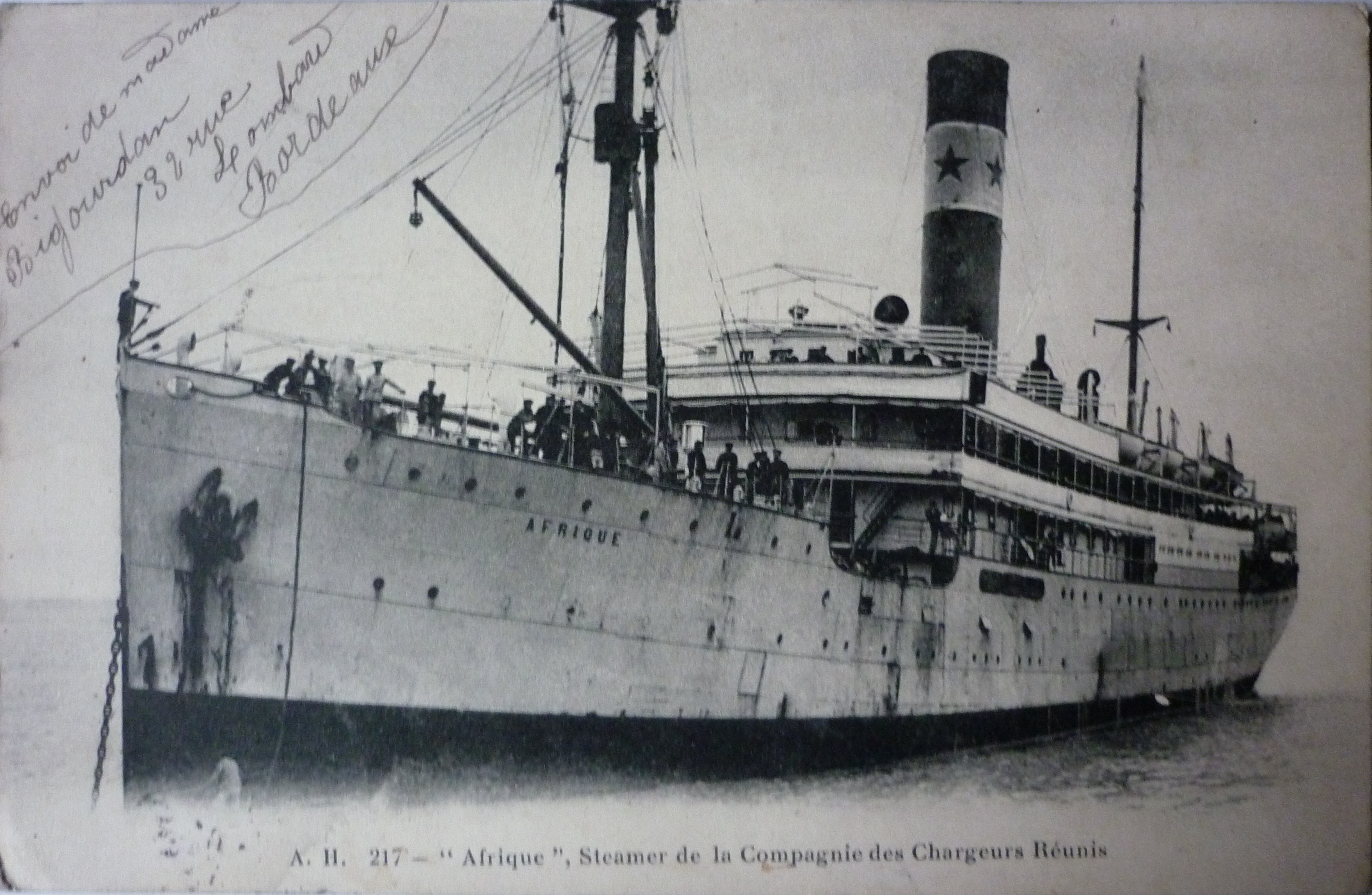 Paquebot Afrique vers 1910, carte postale, photographe éditeur A. Huc. Le paquebot Afrique a fait naufrage en Janvier 1920